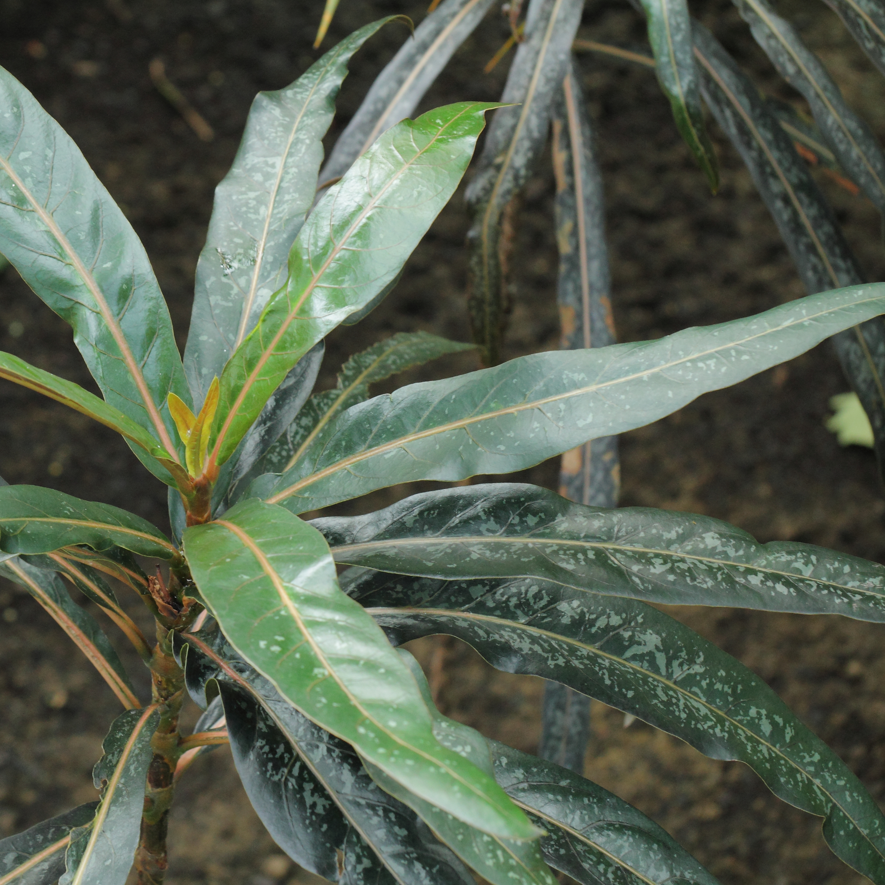 Ramosmania rodriguesii, identifierad med hjälp av befintlig skylt vid Kew Gardens, London.